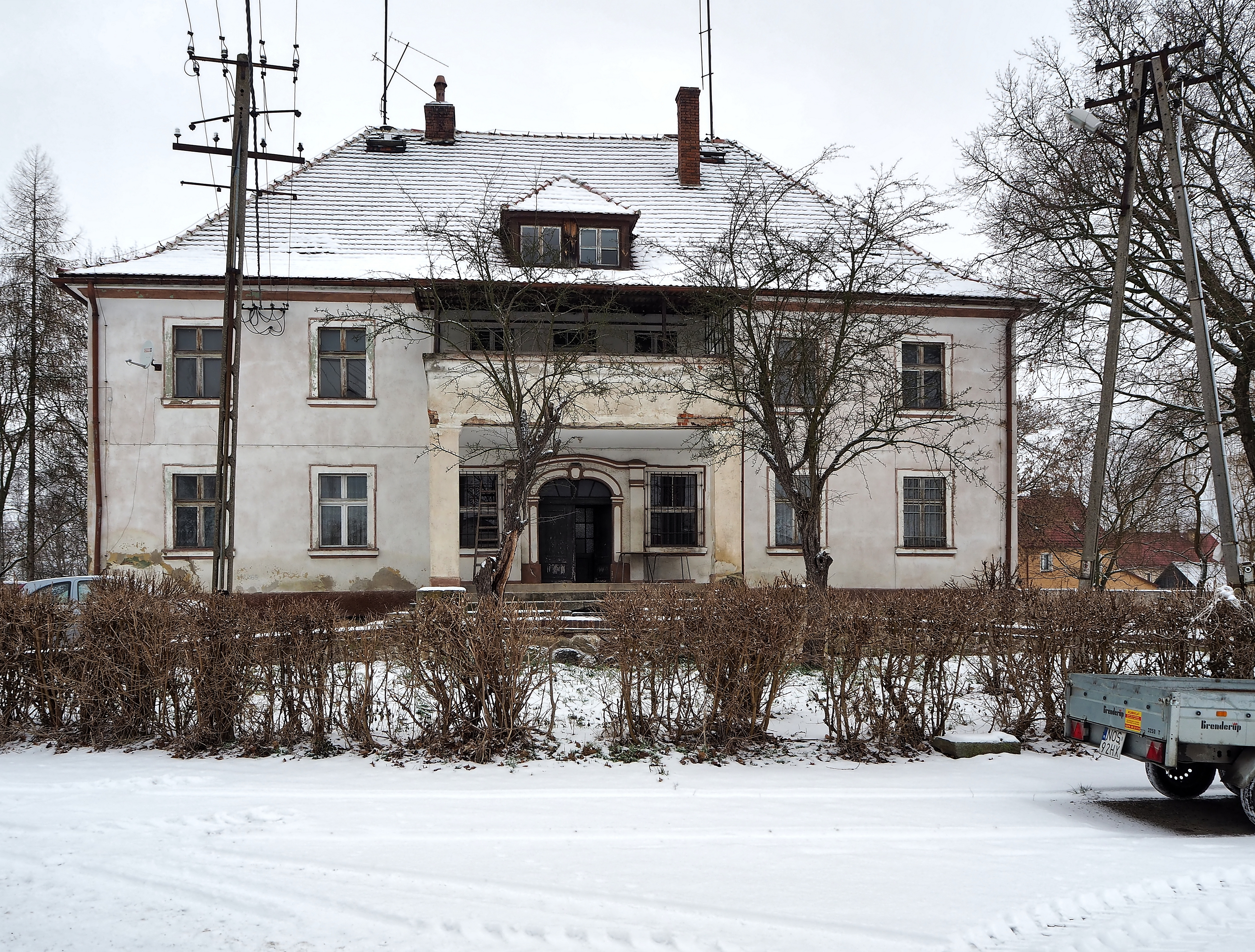 Budynek dyrekcji byłego Państwowego Gospodarstwa Rolnego z siedzibą w Goliszowie (powiat legnicki, gmina Chojnów)